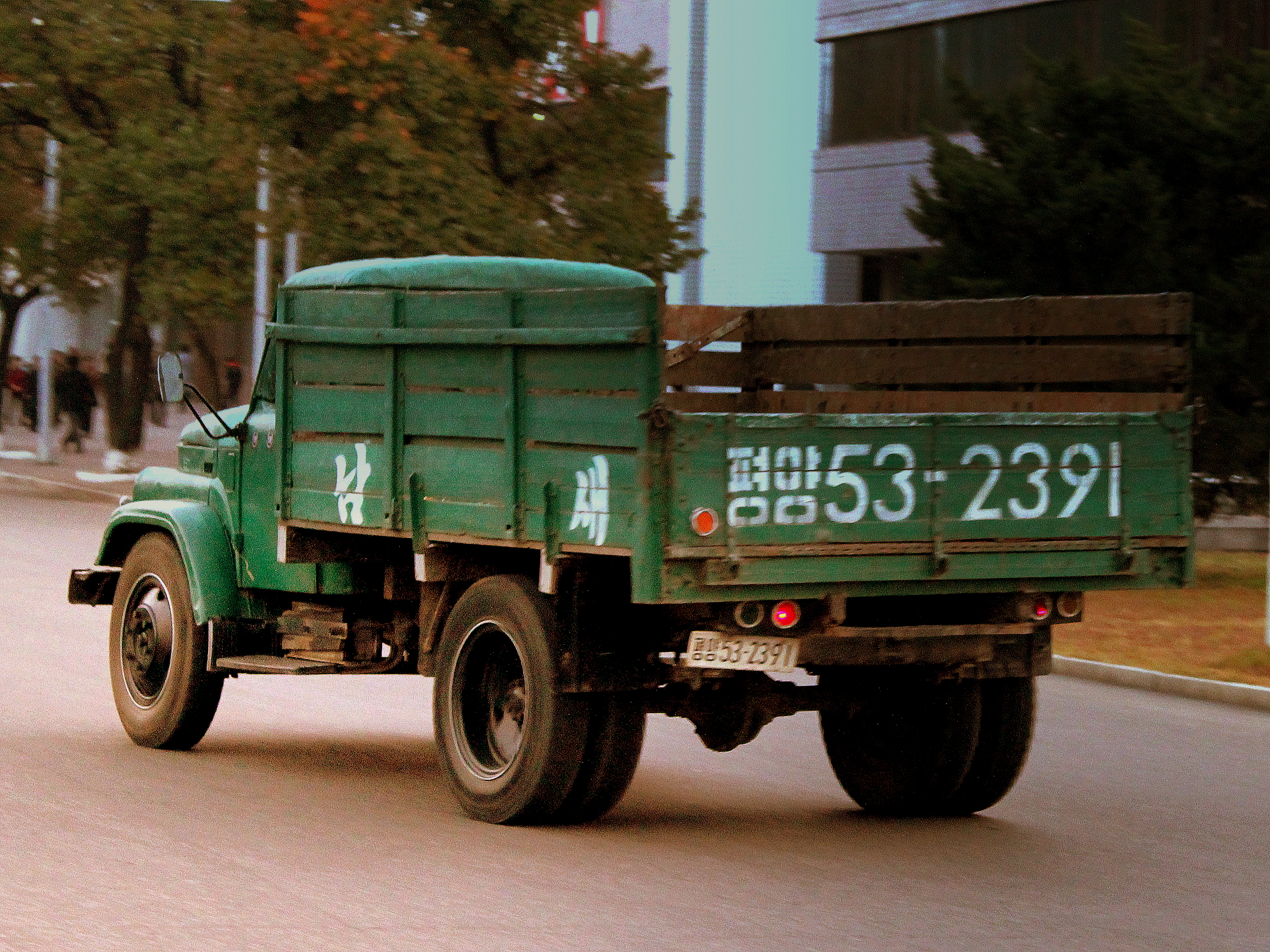 SUNGRI 58 NORTH KOREAN TRUCK (BASED ON A RUSSIAN DESIGN)IN PYONGYANG CITY DPRK NORTH KOREA OCT 2012